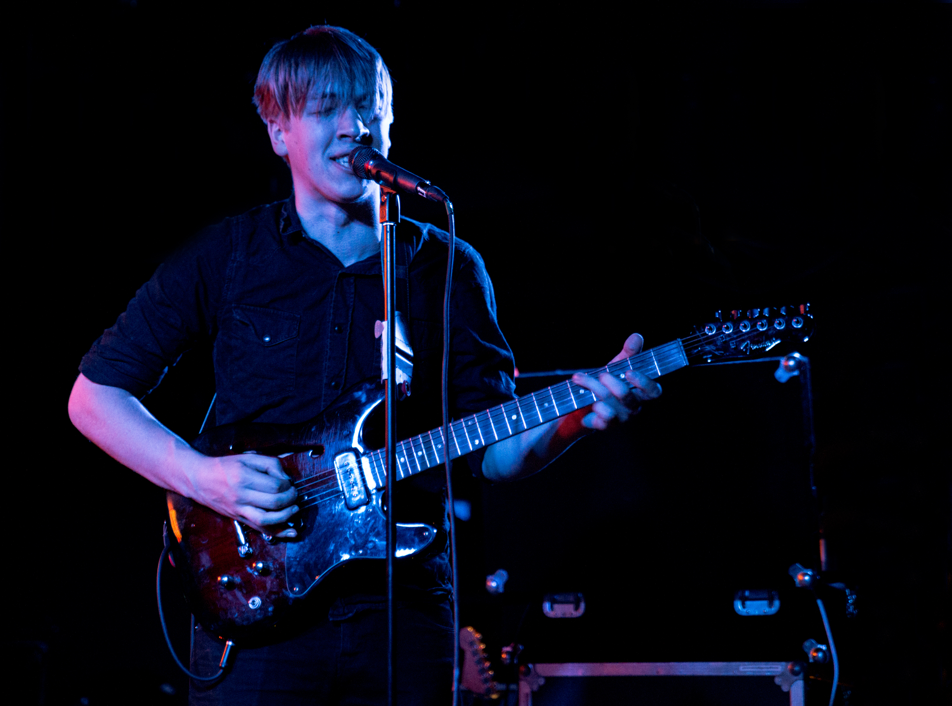 de Drenge 2014 Muenchen Strom